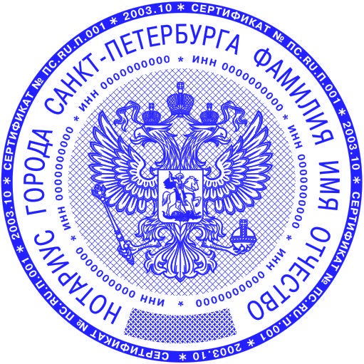 Новая (после 2003 года) печать нотариуса города Санкт-Петербурга. Образец.